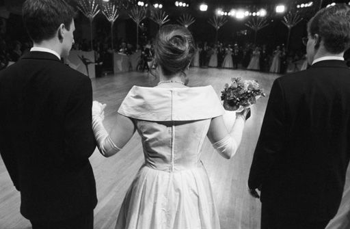 Debütanten auf dem Chrysanthemenball im Deutschen Theater München